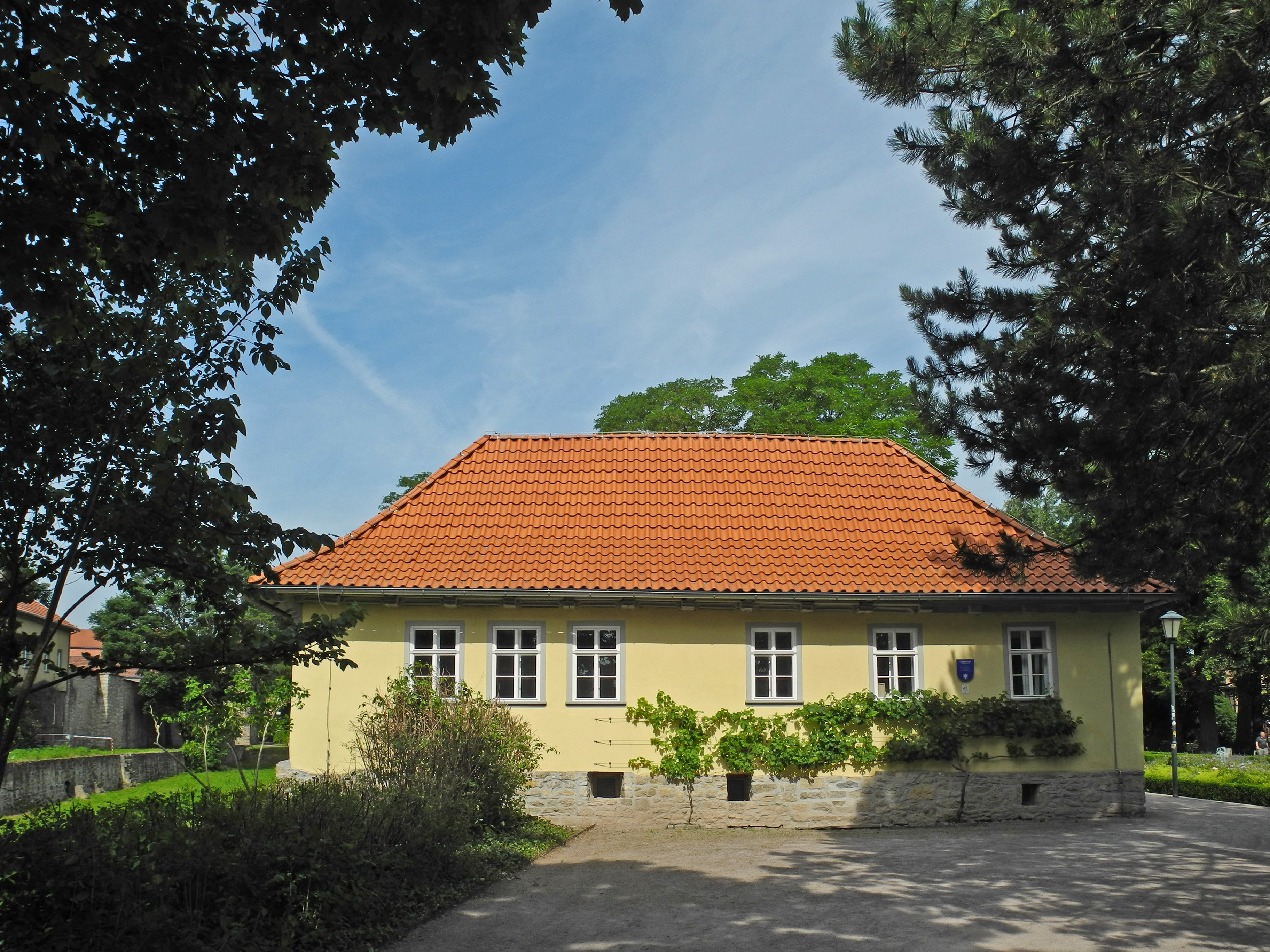 Gärtnerhaus im Schlossgarten in Arnstadt